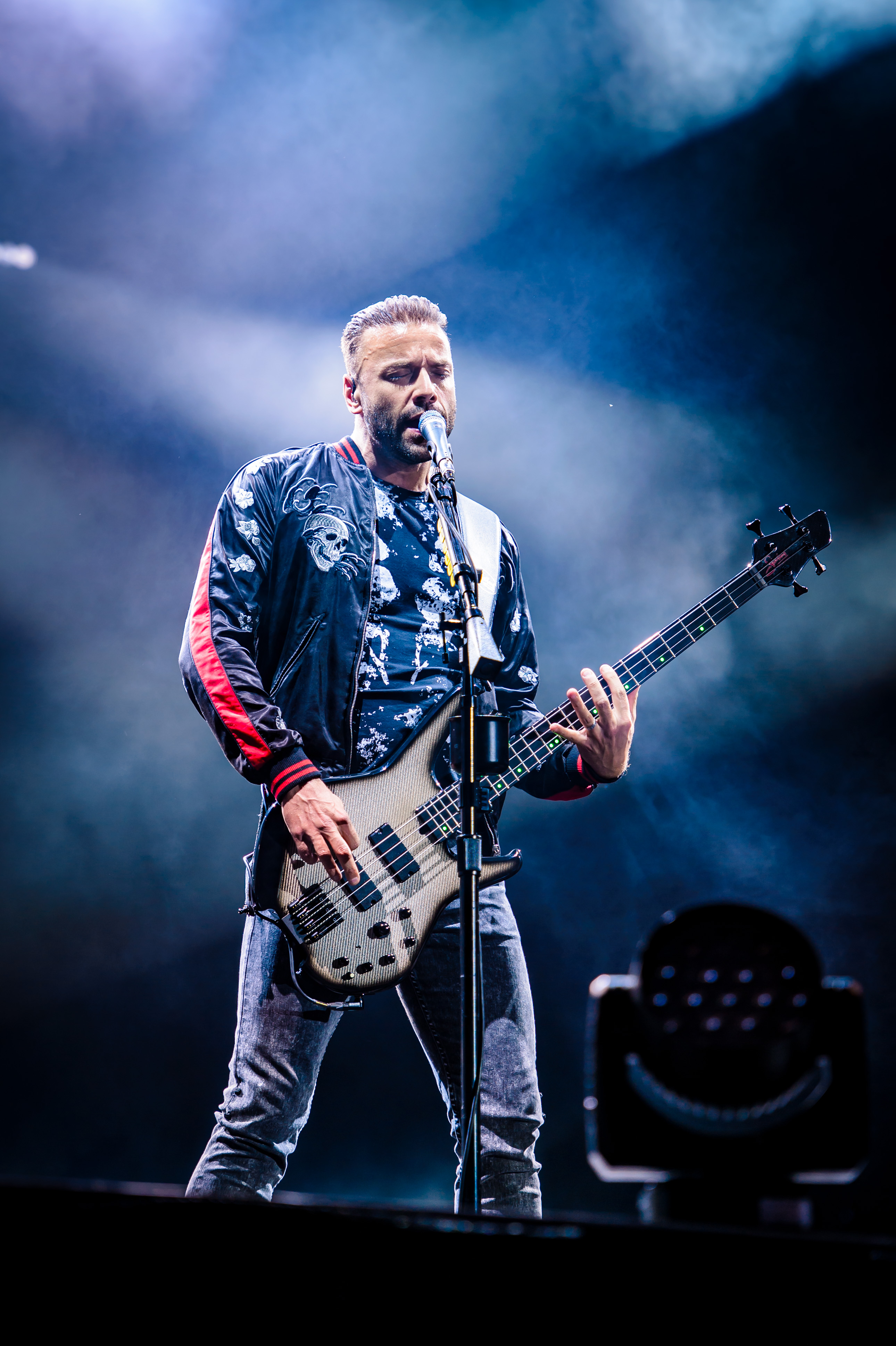 'Rock im Park 2018; Zeppelinfeld Nürnberg': 'Muse'